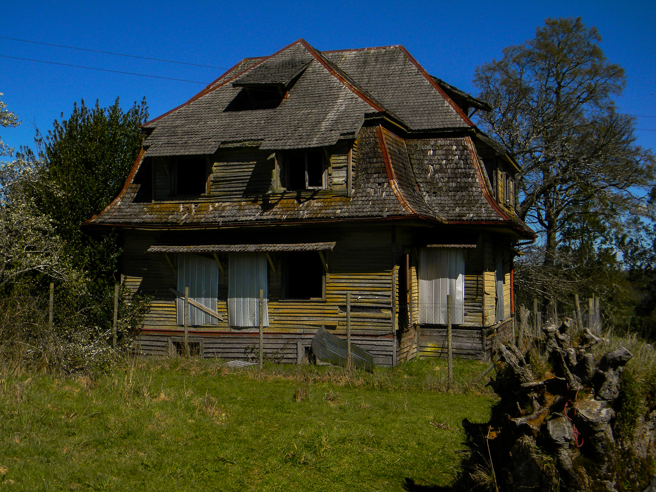 Casa del Fundo El Llolly This is a photo of a national monument in Chile: 2235